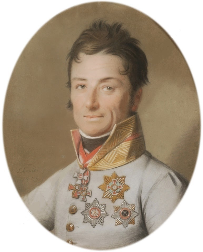 Jan hrabě z Klenového, svobodný pán z Janovic, generál jízdy